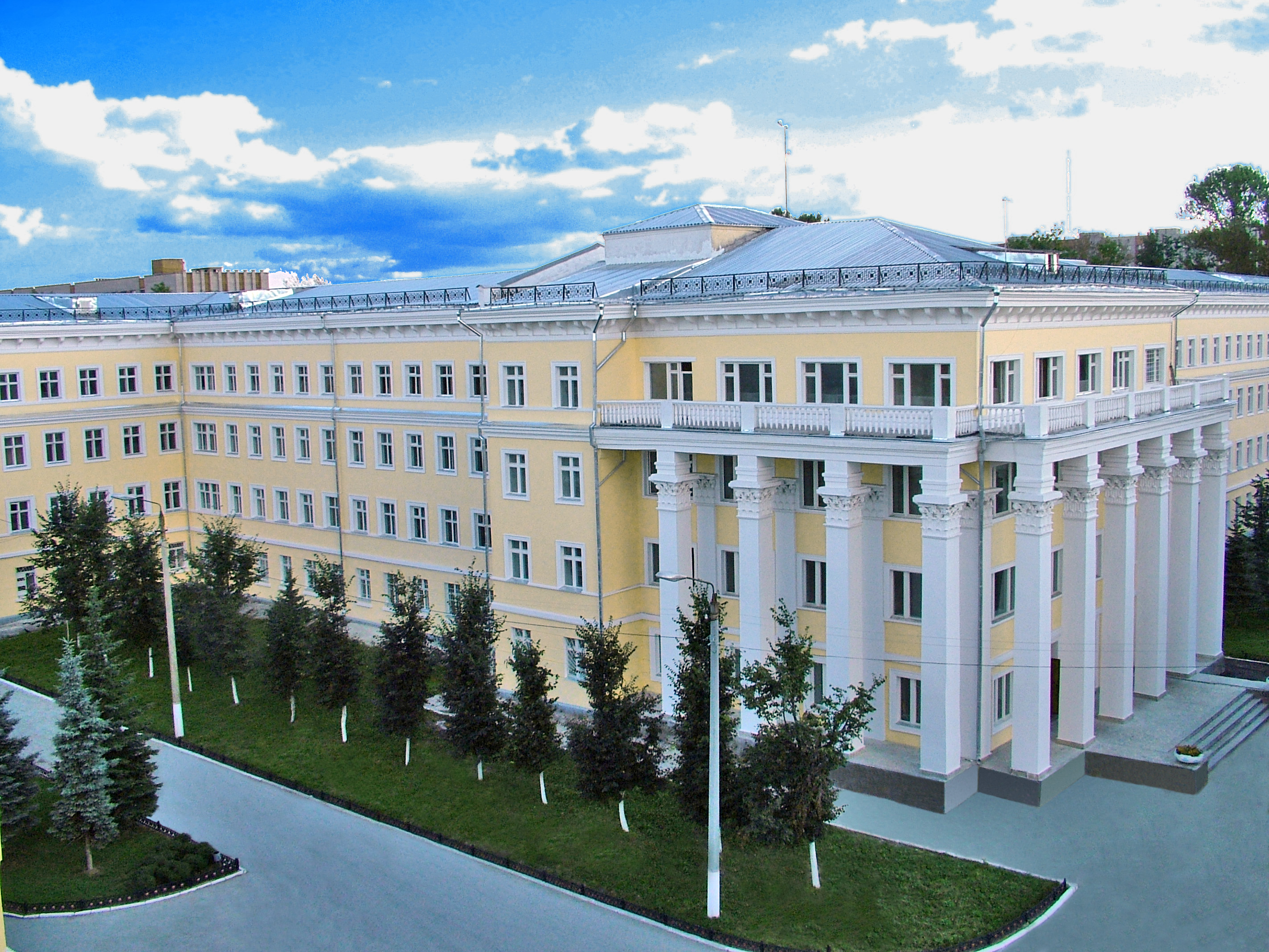 Главный учебный корпус ТАИИ